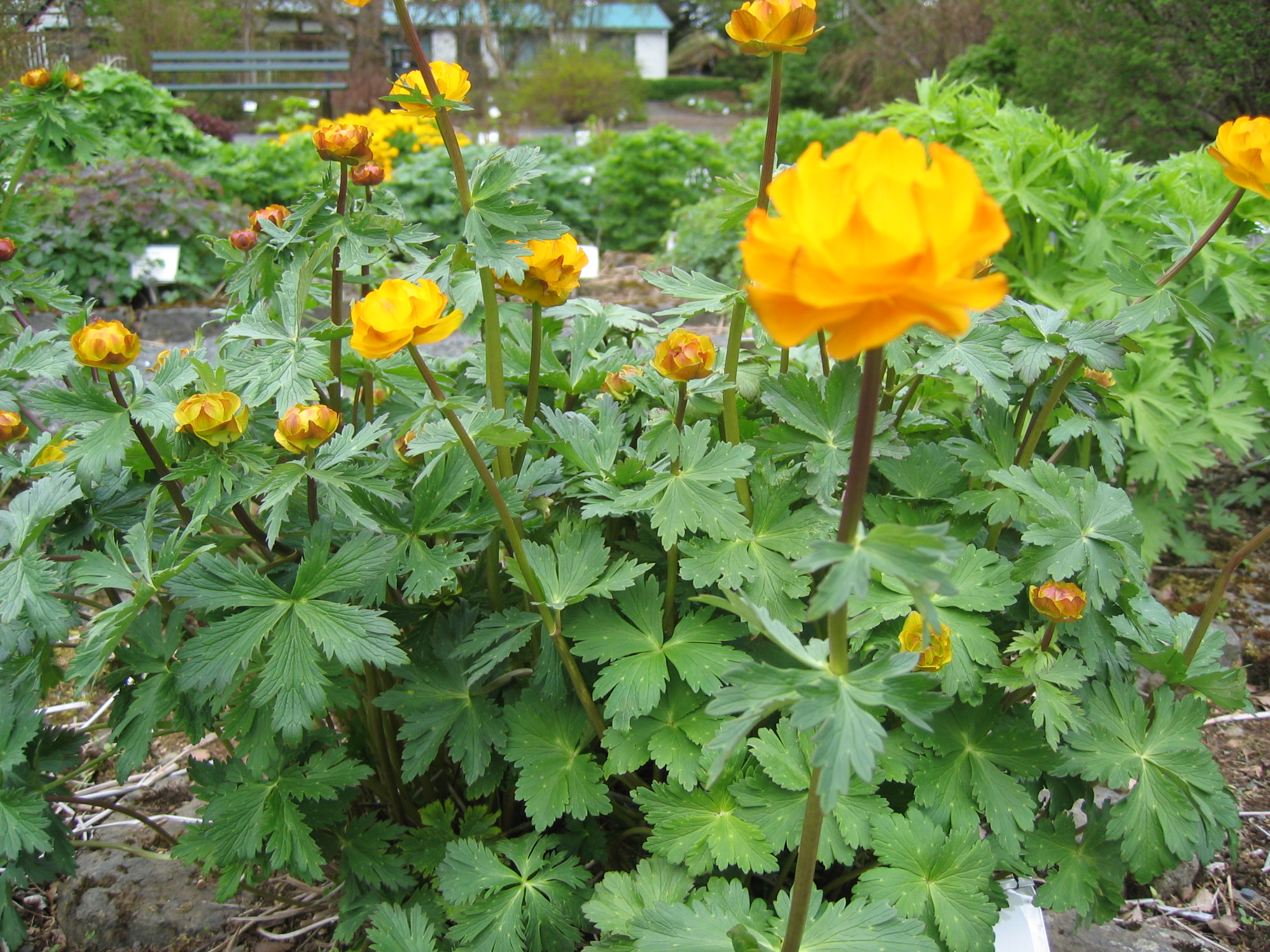 photo taken by Salvör in Grasagarður Reykjavíkur Botanical garden in Reykjavik, Iceland.